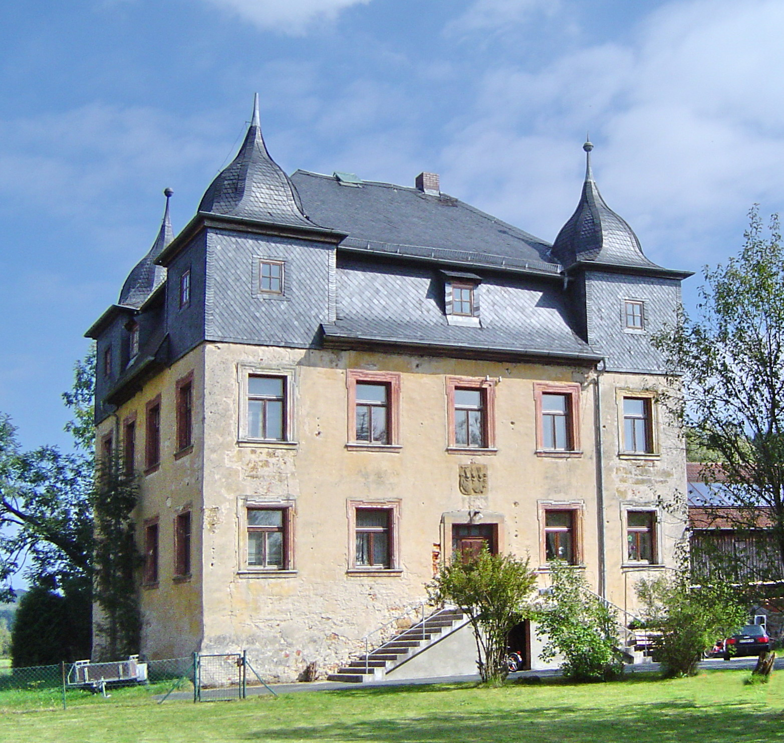 Schloss Truppach bei Mistelgau (Oberfranken)